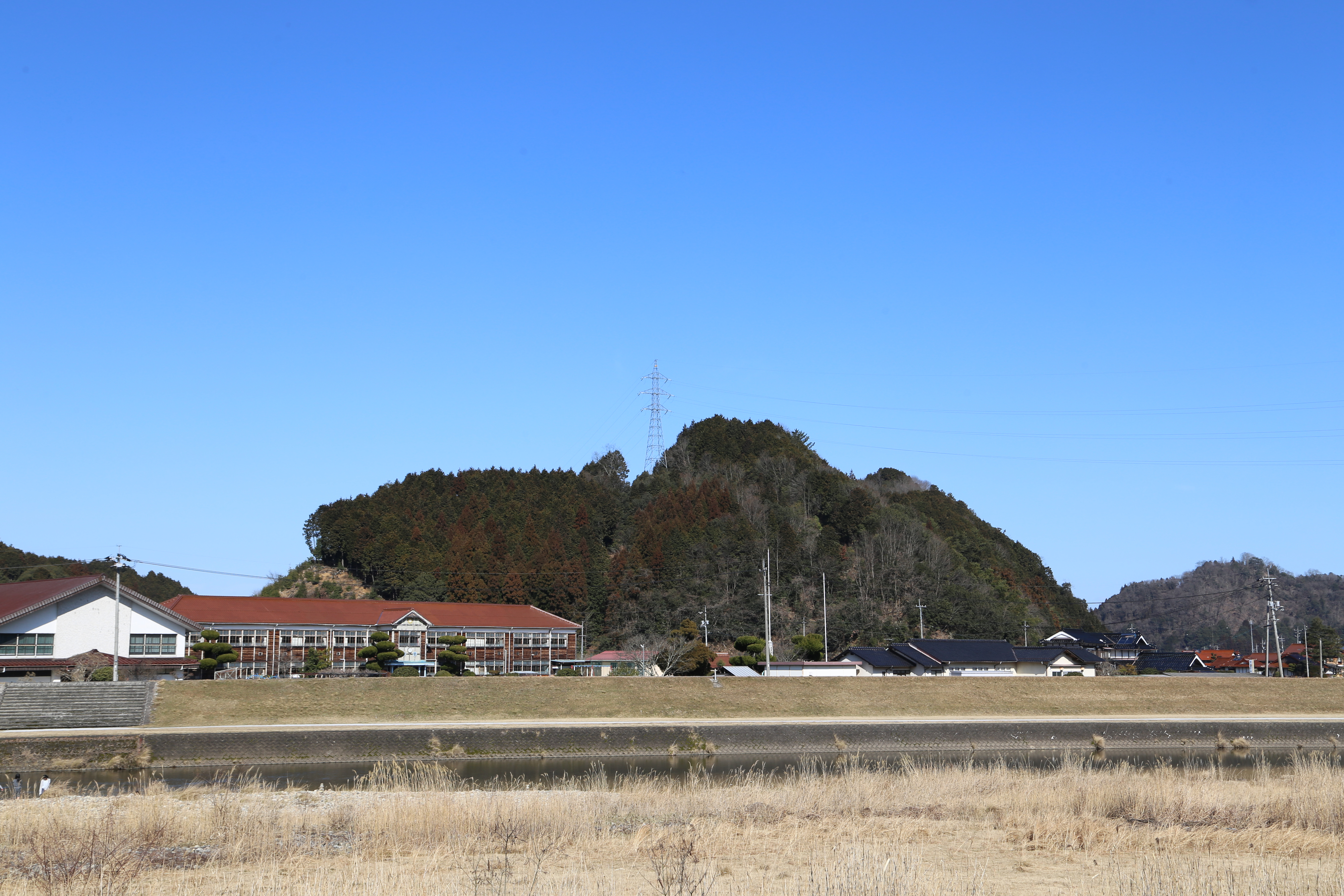 安芸国桂城遠景